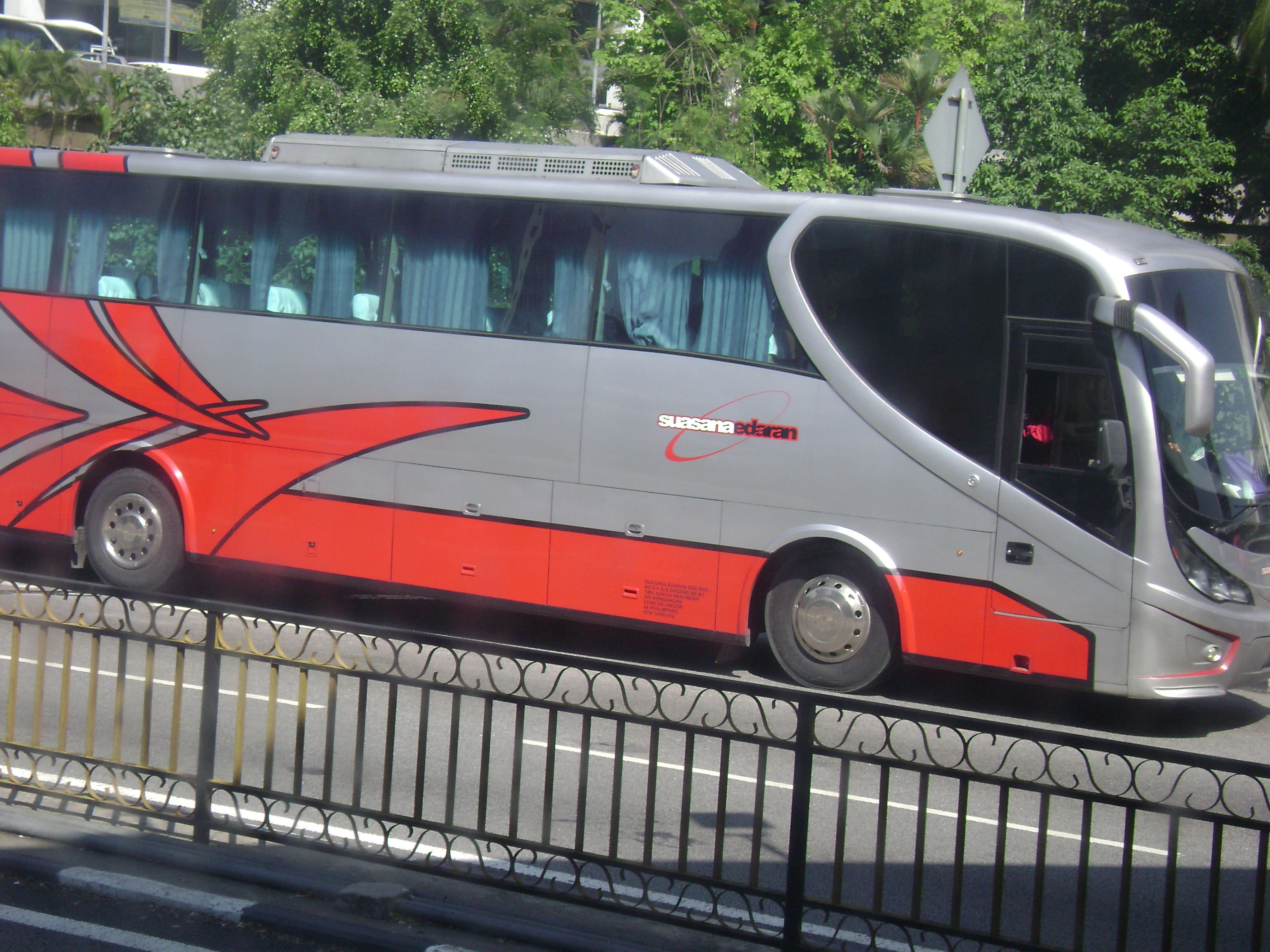 Suasana Edaran bus